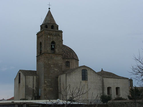 Villanovafranca , San Lorenzo church